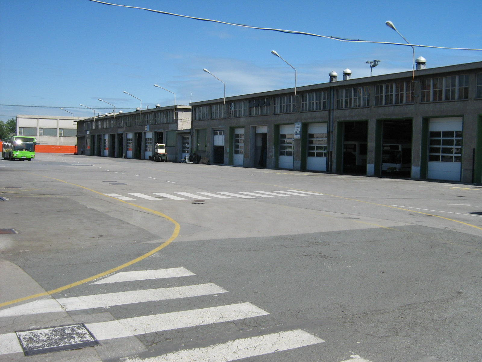 Delavnice Ljubljanskega potniškega prometa. Avtor: Uporabnik:BurekBuster